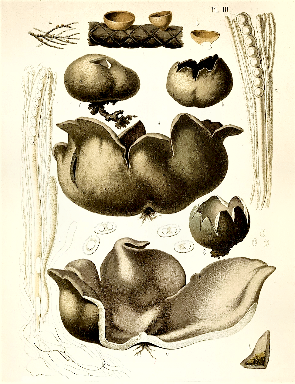 Jules de Seynes: Recherches pour servir à l'histoire naturelle des végétaux inférieurs – Des Pezizes, vol. 2, Ed. G. Masson & F. Savy, Paris 1880, planche III